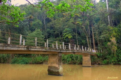 Rio jundiá